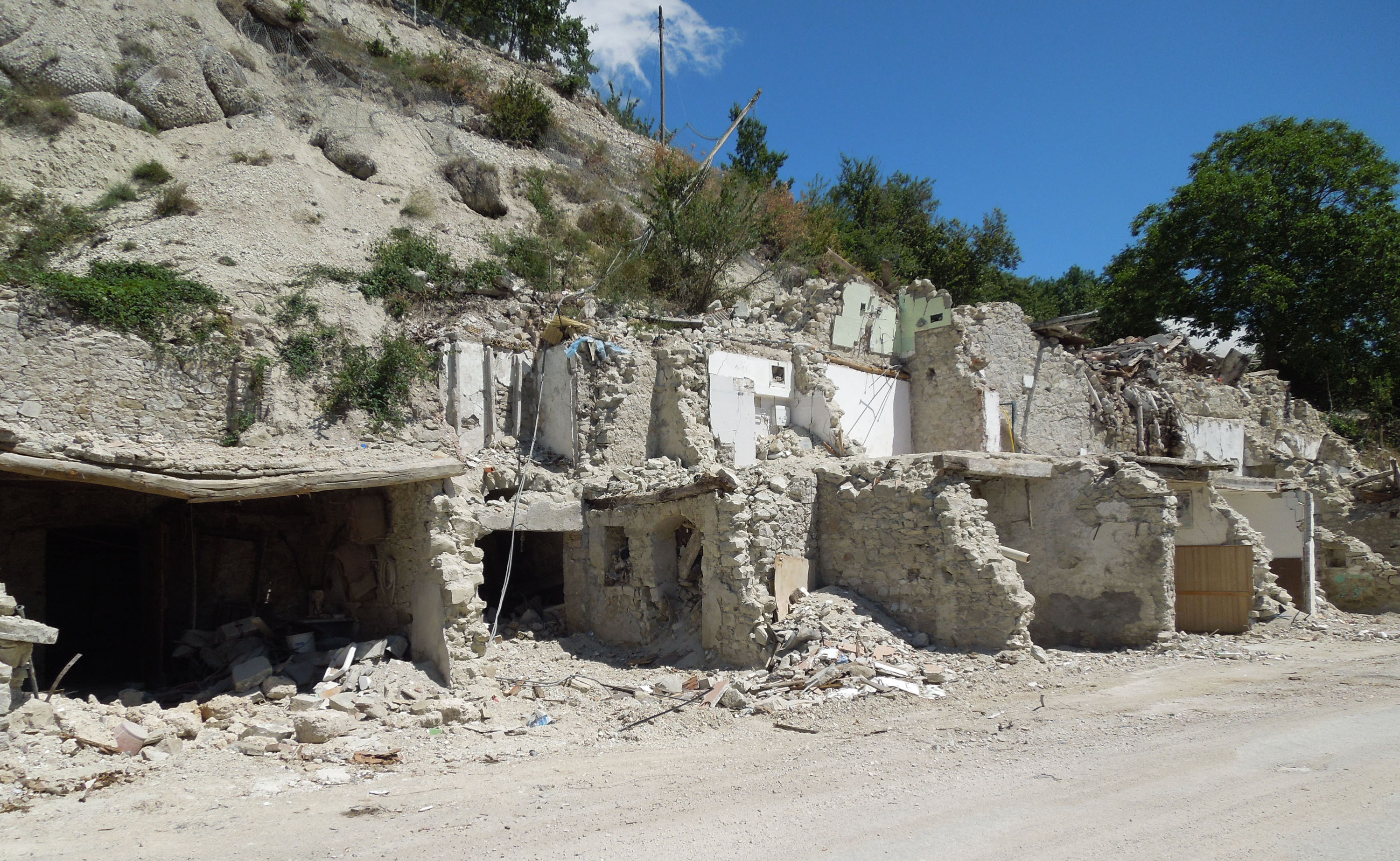 Macerie di alcune abitazioni di Pescara del Tronto che sorgevano lungo la Vecchia Salaria, oggi SP129. L'immagine è stata scattata all'interno della zona rossa il 27 luglio 2017.